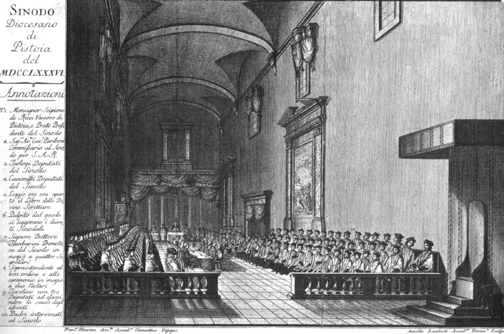 Incisione del 1786, sinodo diocesano in Pistoia (seminario vescovile)